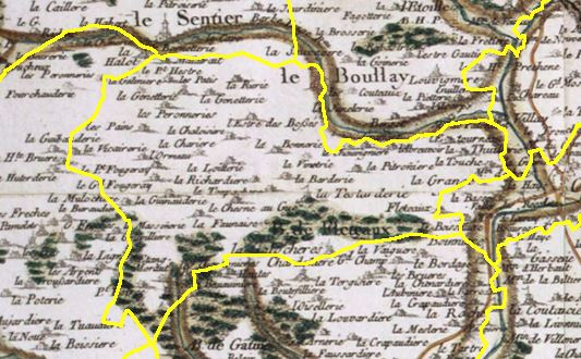 Le Boulay sur la carte de Cassini (les limites communales figurant en jaune.